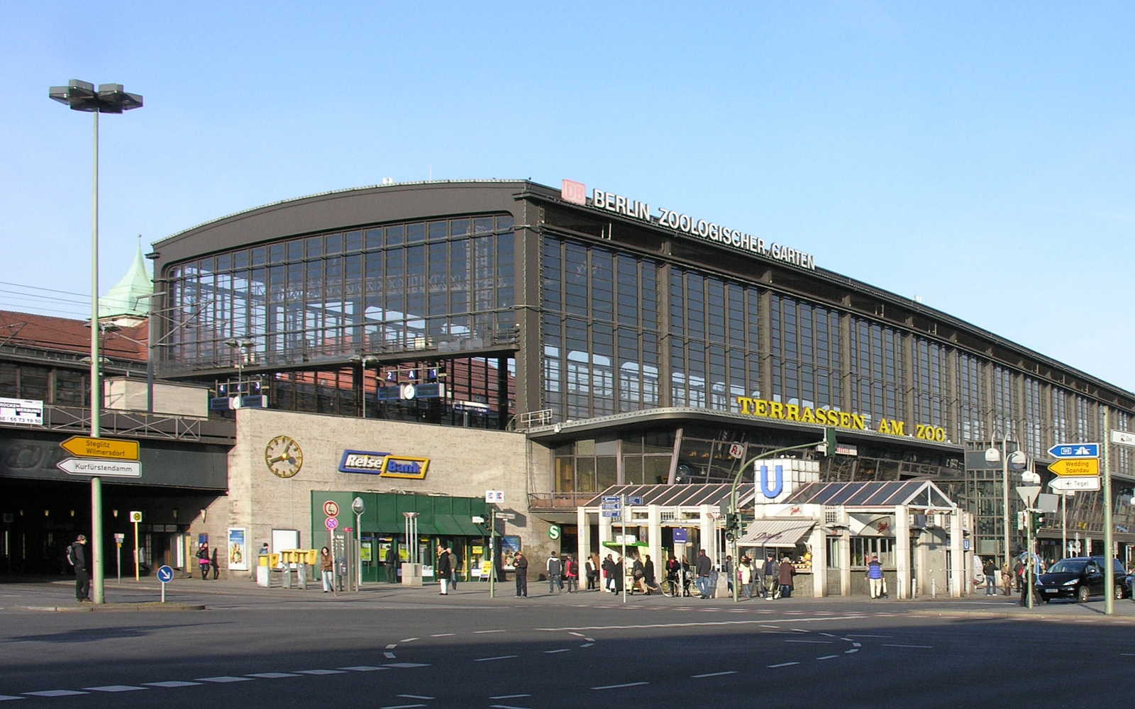 Berlin Bahnhof Zoo Zoologischer Garten Foto 2007 Wolfgang Pehlemann Wiesbaden IMG_4621